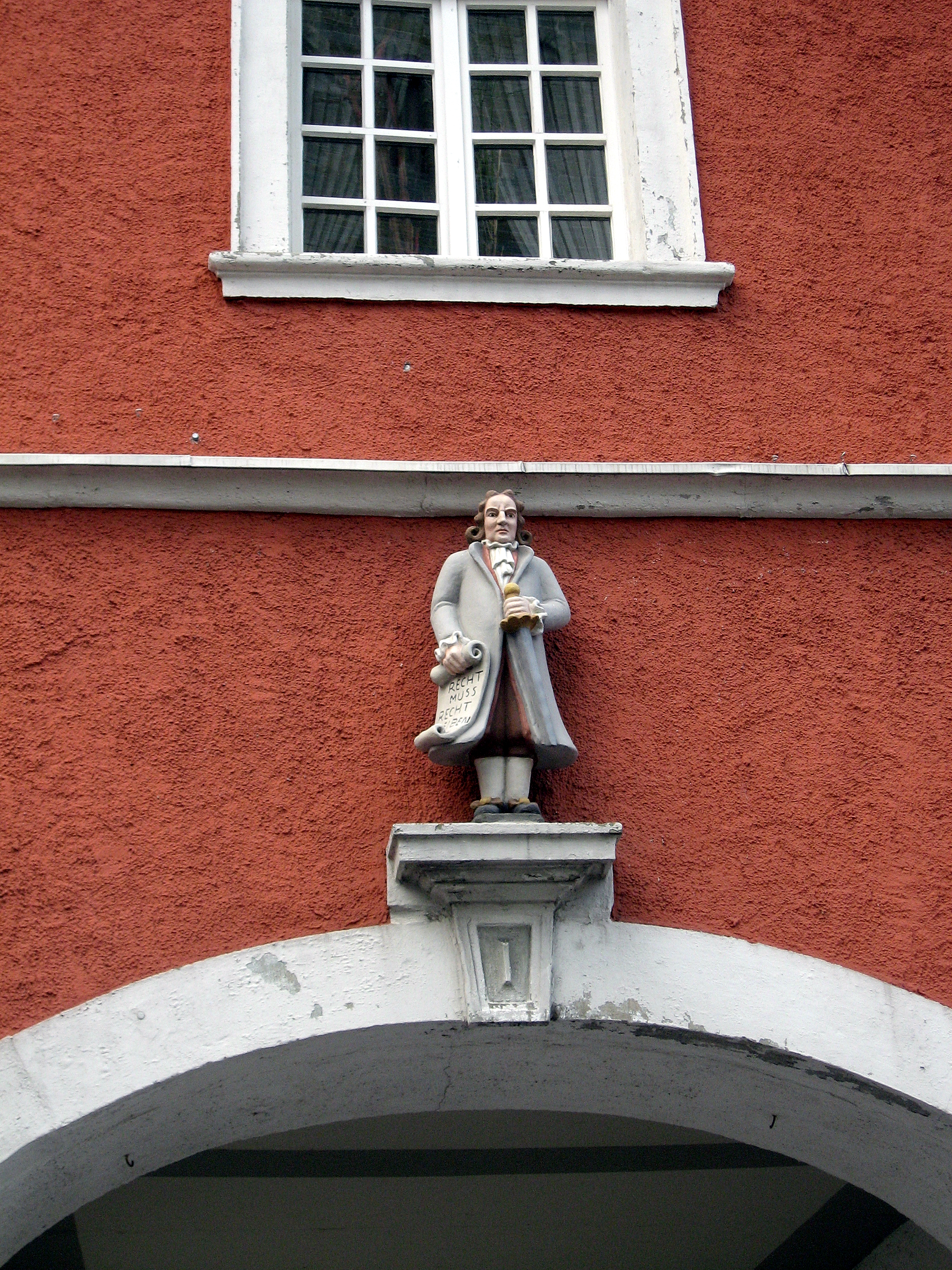 Soest, Rathaus Von dem Rathaus des 13. Jahrhunderts nur noch Reste, der barocke Bau wurde 1713/14 ersetzt als Ausdruck gewachsener Wirtschaftskraft nach dem 30-jährigen Krieg